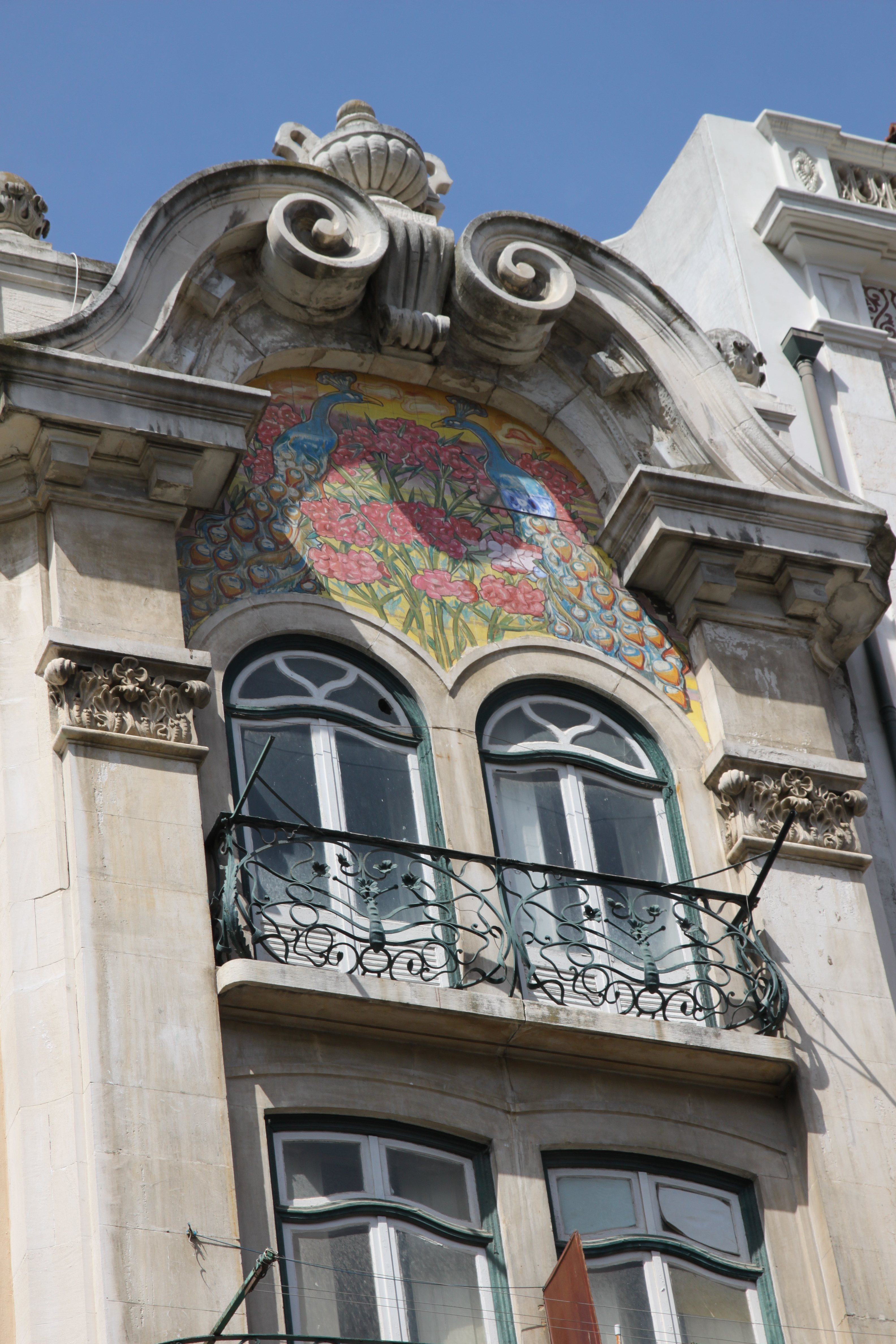 Edifício na Avenida Almirante Reis, n.º 2 a 2K (fachada posterior)